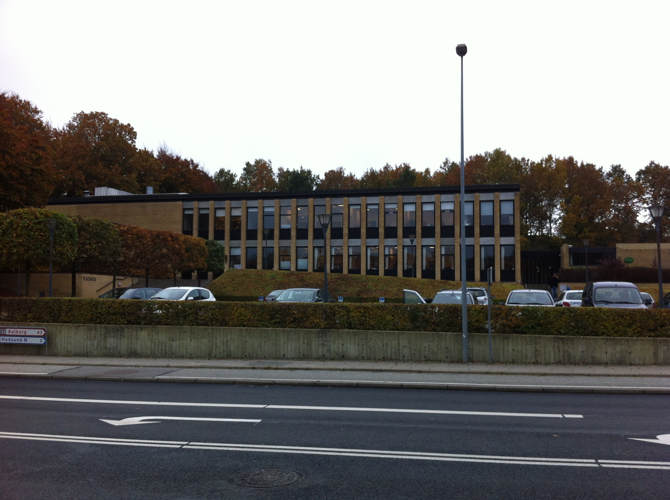 Hadsund Rådhus set fra Himmerlandsgade i Hadsund